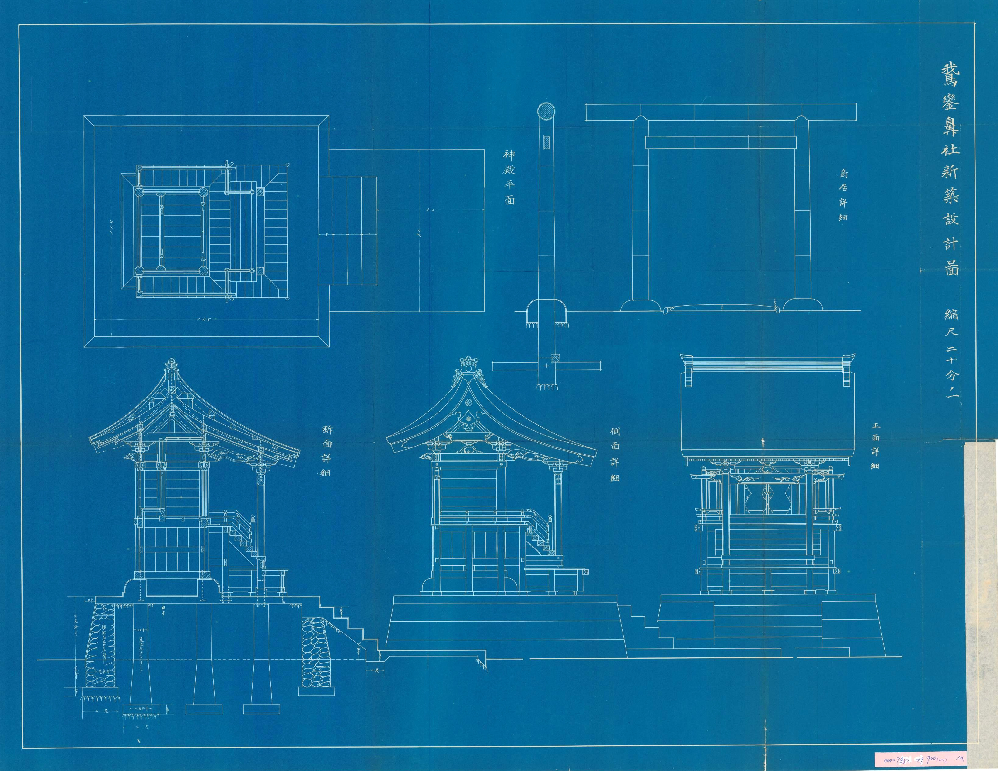 鵝鑾鼻神社設計圖，包含神社本殿與鳥居